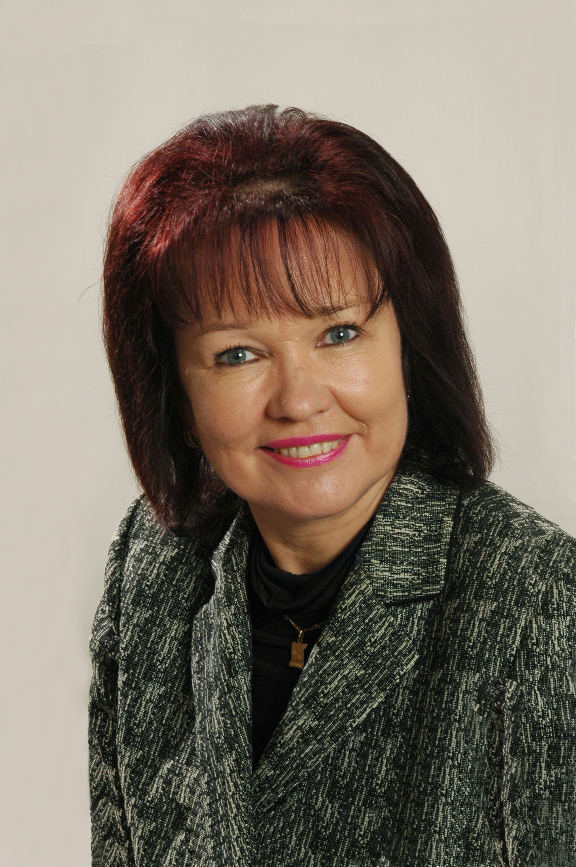 10.Saeimas deputāte Dace Reinika